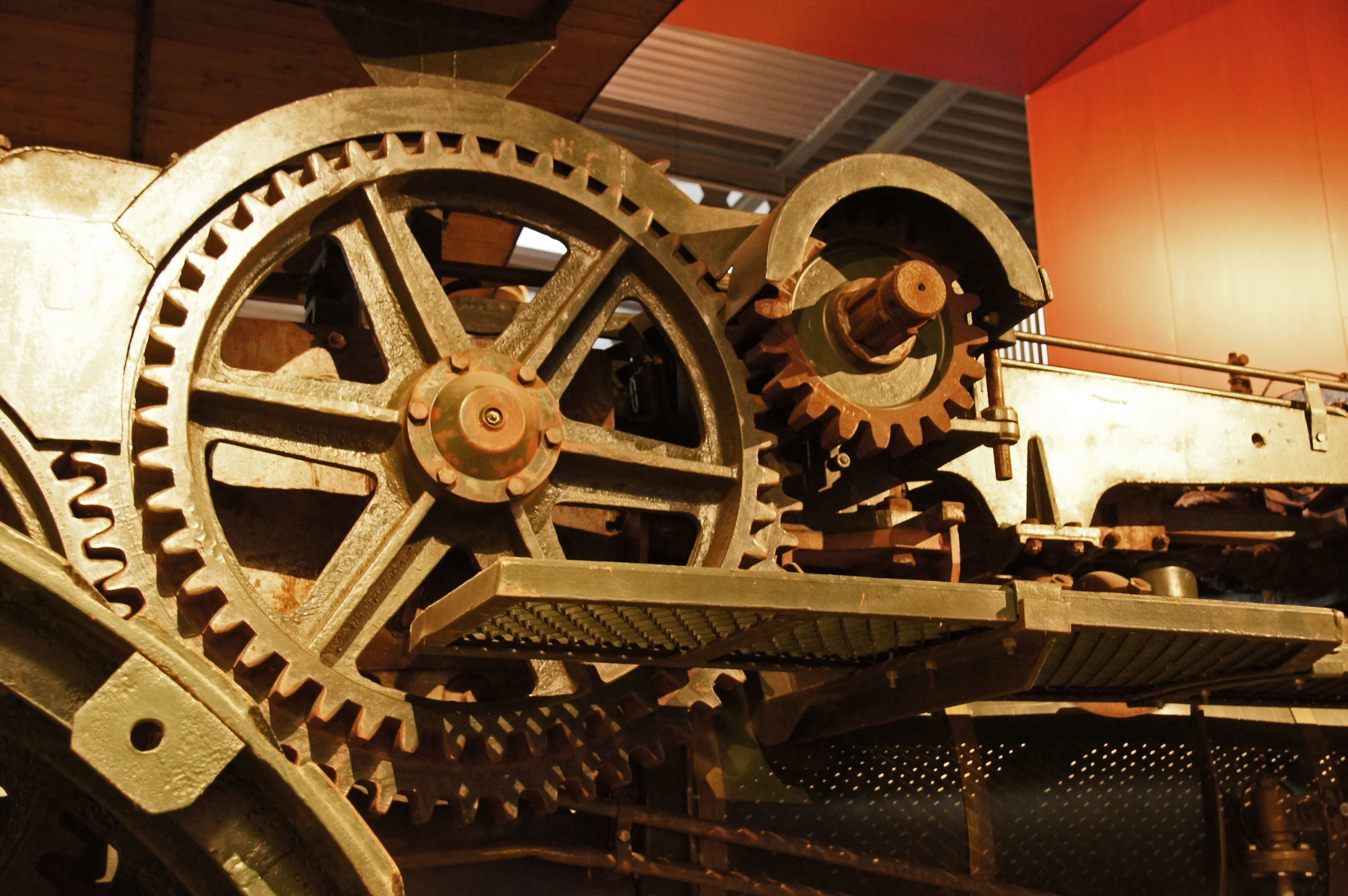 2010-10-30 Geeste, Moormuseum 032